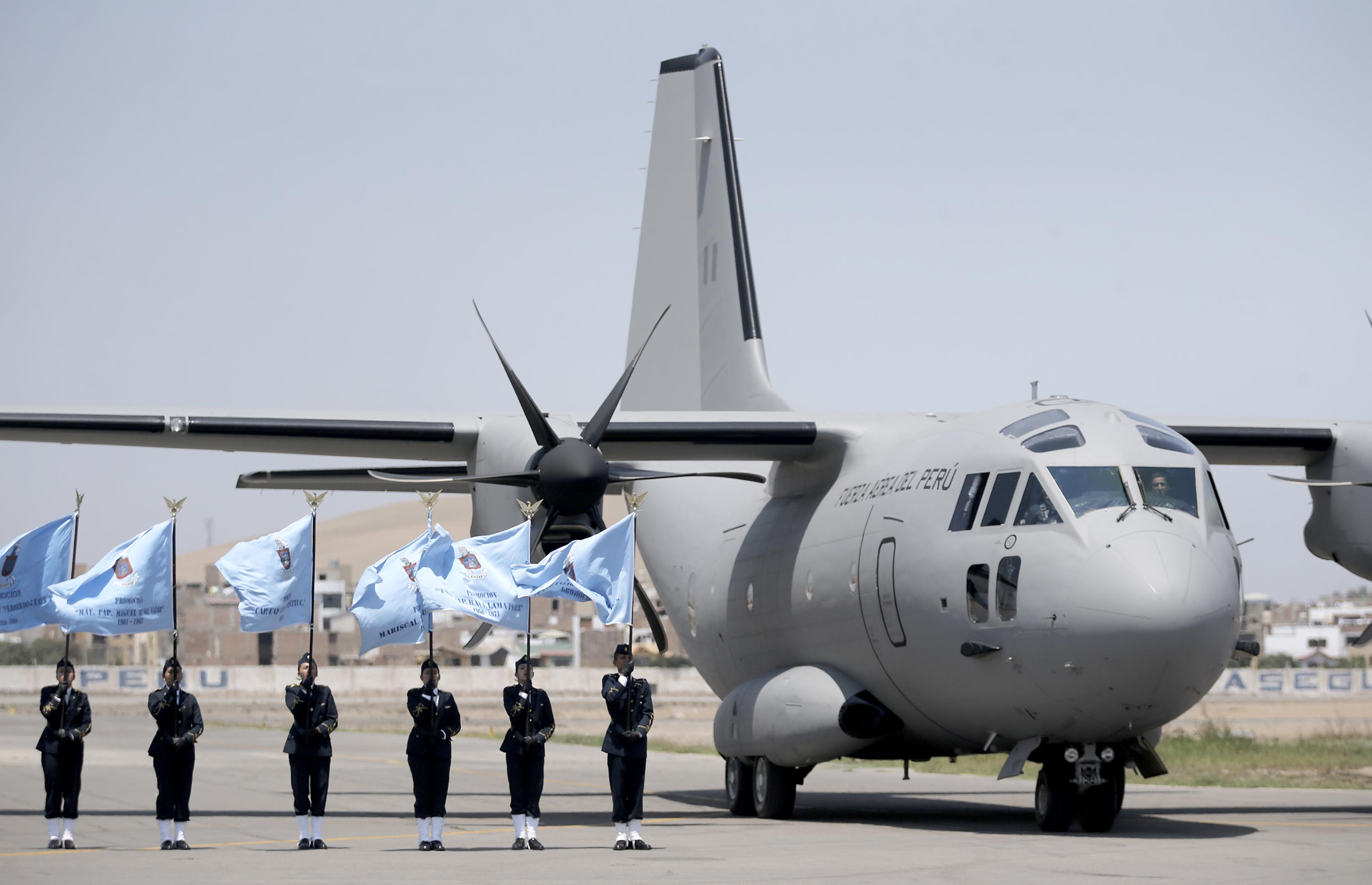 El ministro de Defensa, Pedro Cateriano, presidió la ceremonia de presentación del primer avión de transporte C-27J Spartan, de procedencia italiana, que renovará una flota de dos décadas en la Fuerza Aérea del Perú.